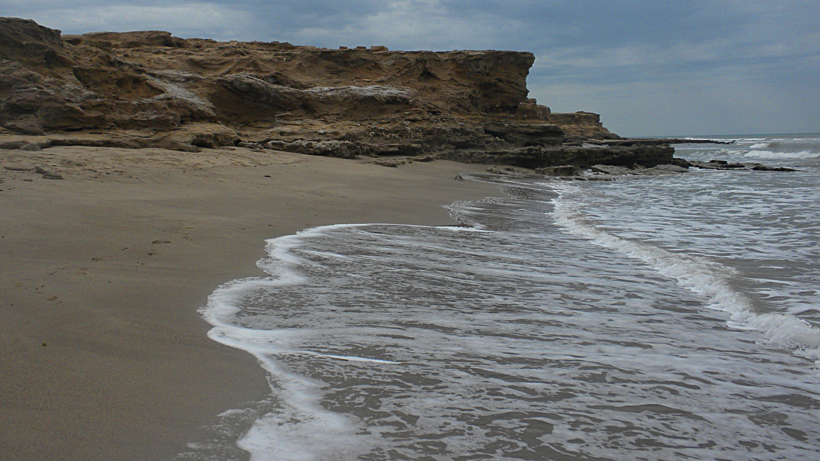 Bahía de los vientos, Quequén, Provincia de Buenos Aires, Argentina